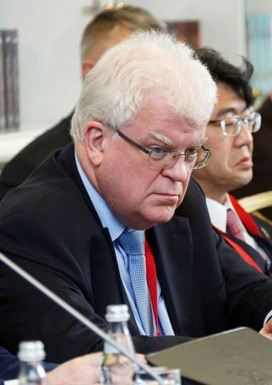 Владимир Алексеевич Чижов на «круглом столе» «Военные опасности и угрозы в современном мире», проводимом в рамках VIII Московской конференции по международной безопасности